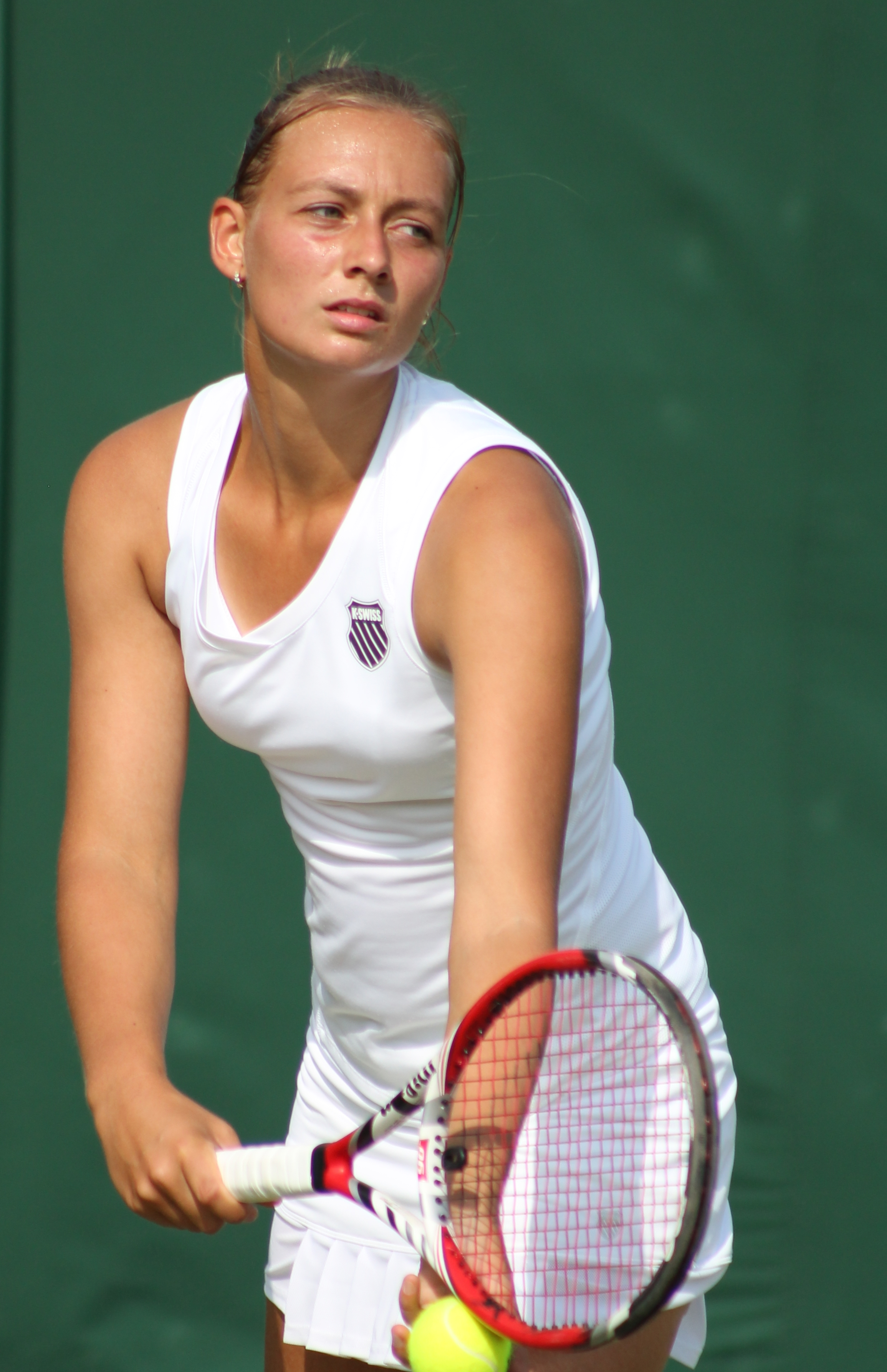 Burger WMQ15 (9)